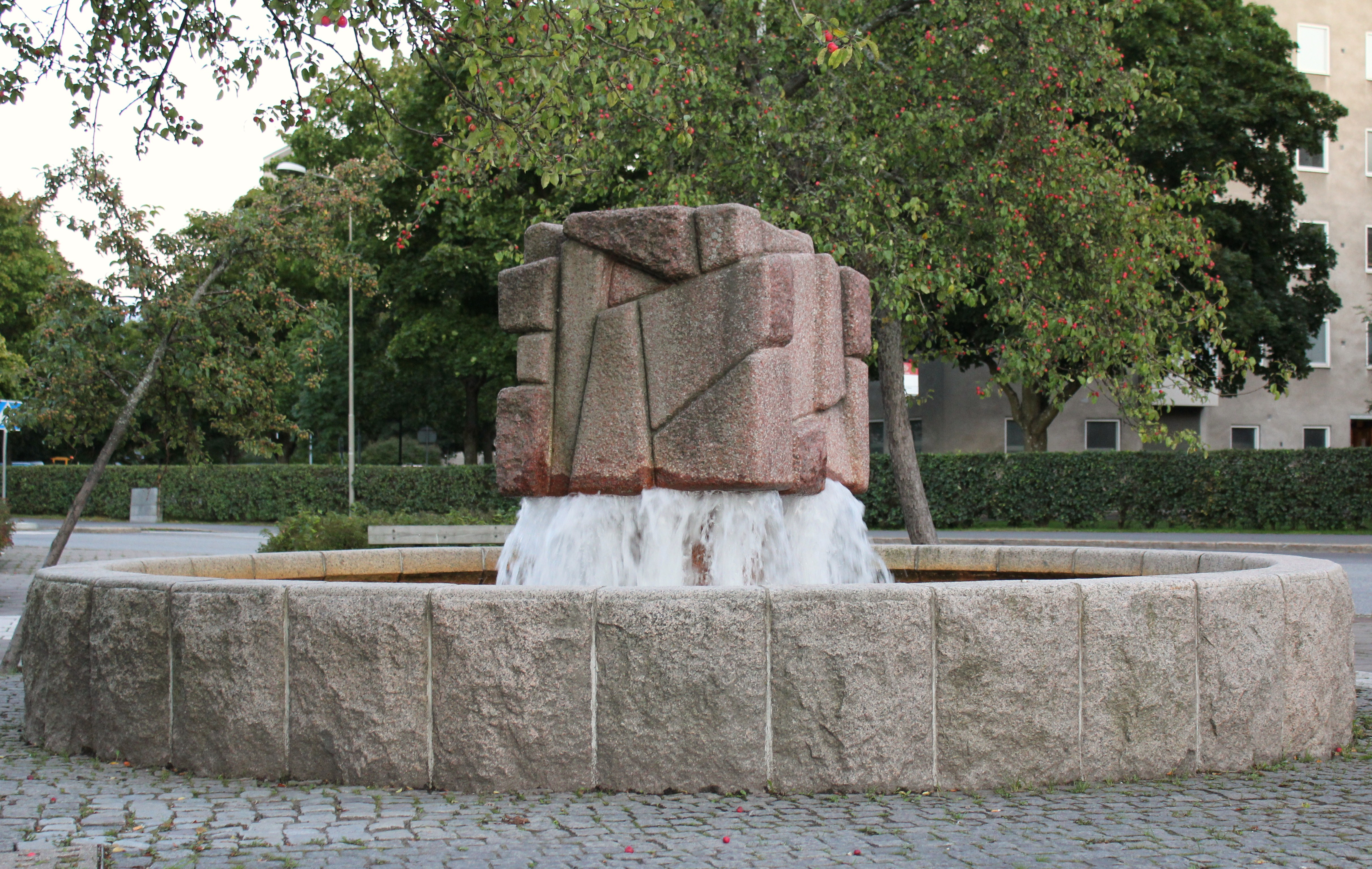 Vallafontänen av Bertil Johnson på Valla Torg i Årsta.